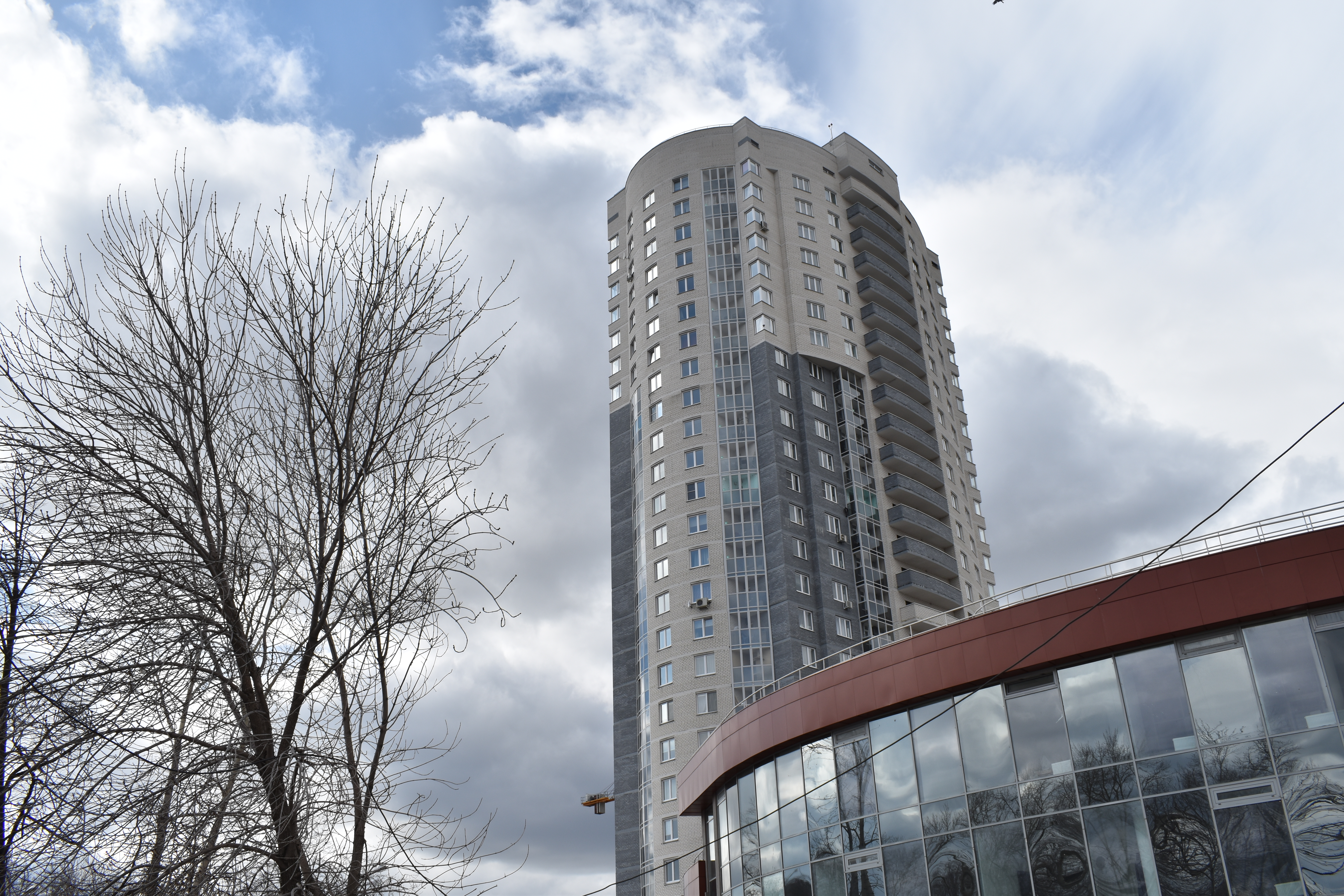 Дом на улице Кировградской, 4 в Екатеринбурге